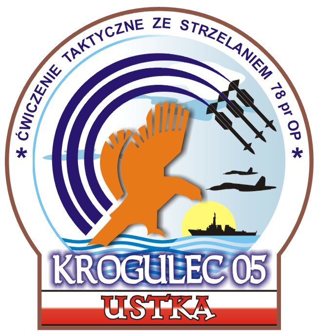 Znak graficzny ćwiczenia pk. KROGULEC-05